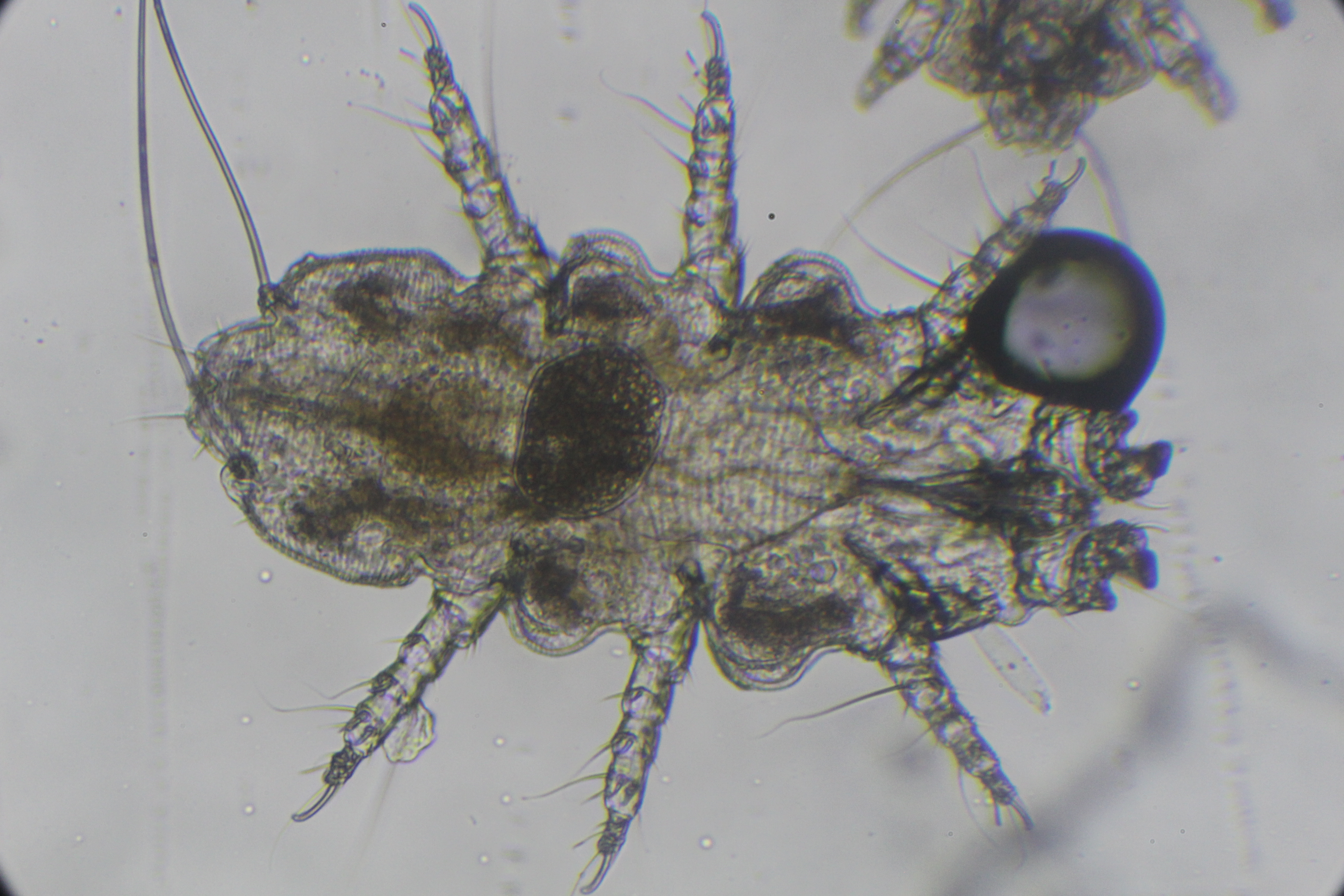 самиця з незаплідненим яйцем